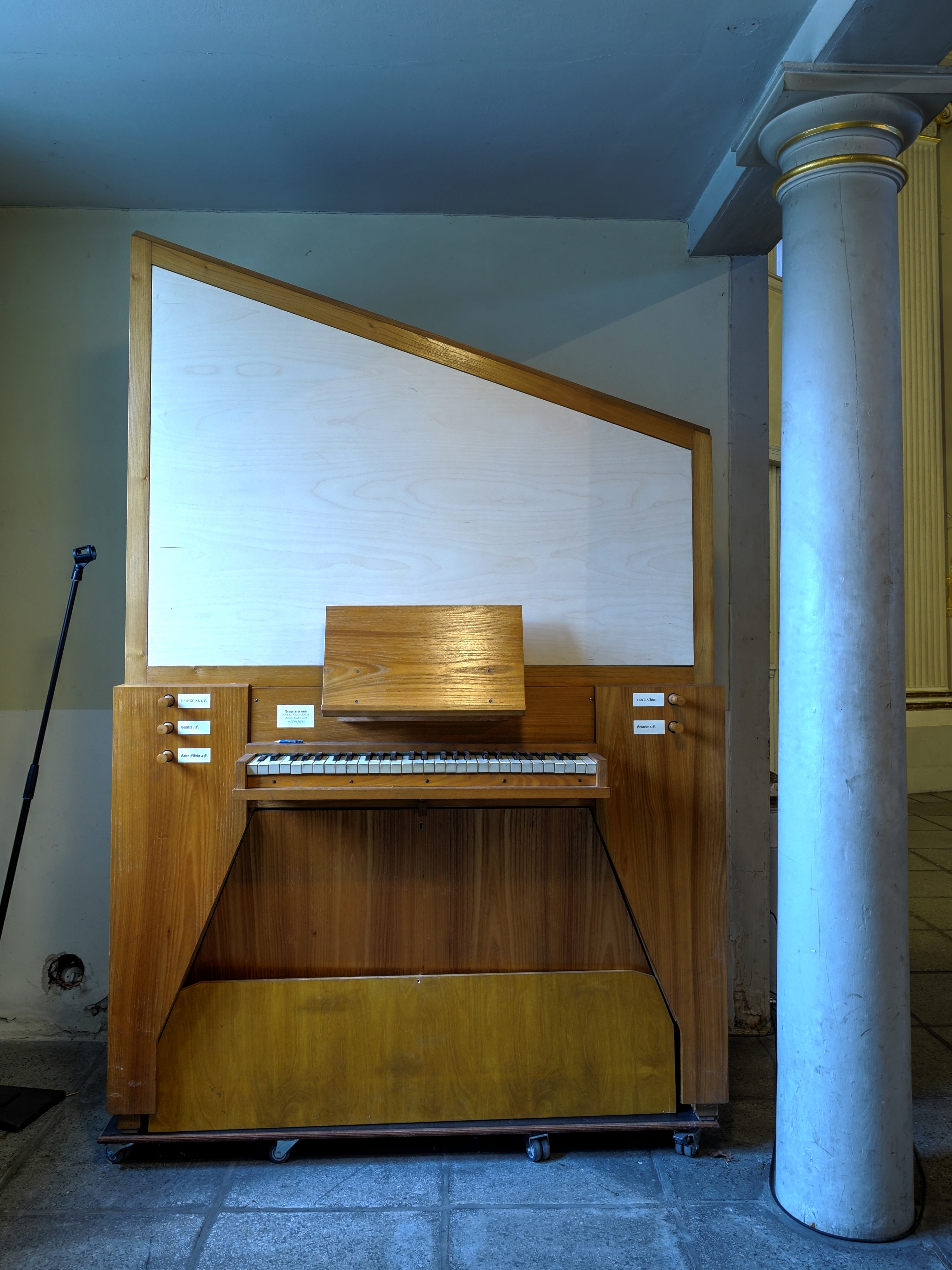 Die Gedächtniskirche Schönefeld in Schönefeld (Leipzig) in Sachsen 2020 - Orgelpositiv gebaut von Kantor Schuricht (Taucha) unter Verwendung von einzelnen Teilen (Pfeifenwerk, Klaviaturen und Orgelbank) der im zweiten Weltkrieg beschädigten Orgel der Fa. Kreutzbach aus Borna